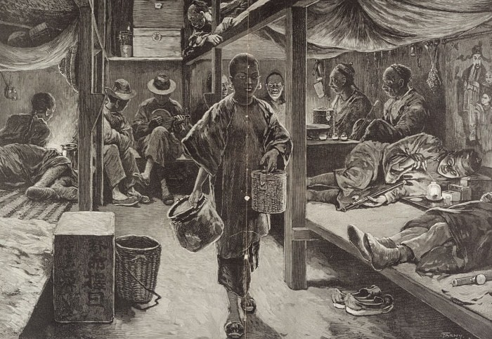 Underground Opium Den in San Francisco.